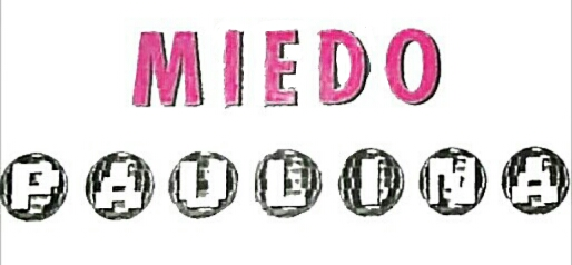 Logo de el sencillo Siempre Tuya Desde La Raíz lanzado en 1996 por Paulina Rubio y Emi